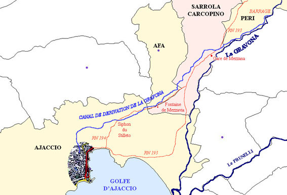 Plan du parcours du Canal de la Gravona sur les communes de Peri, Sarrola-Carcopino, Afa et Ajaccio